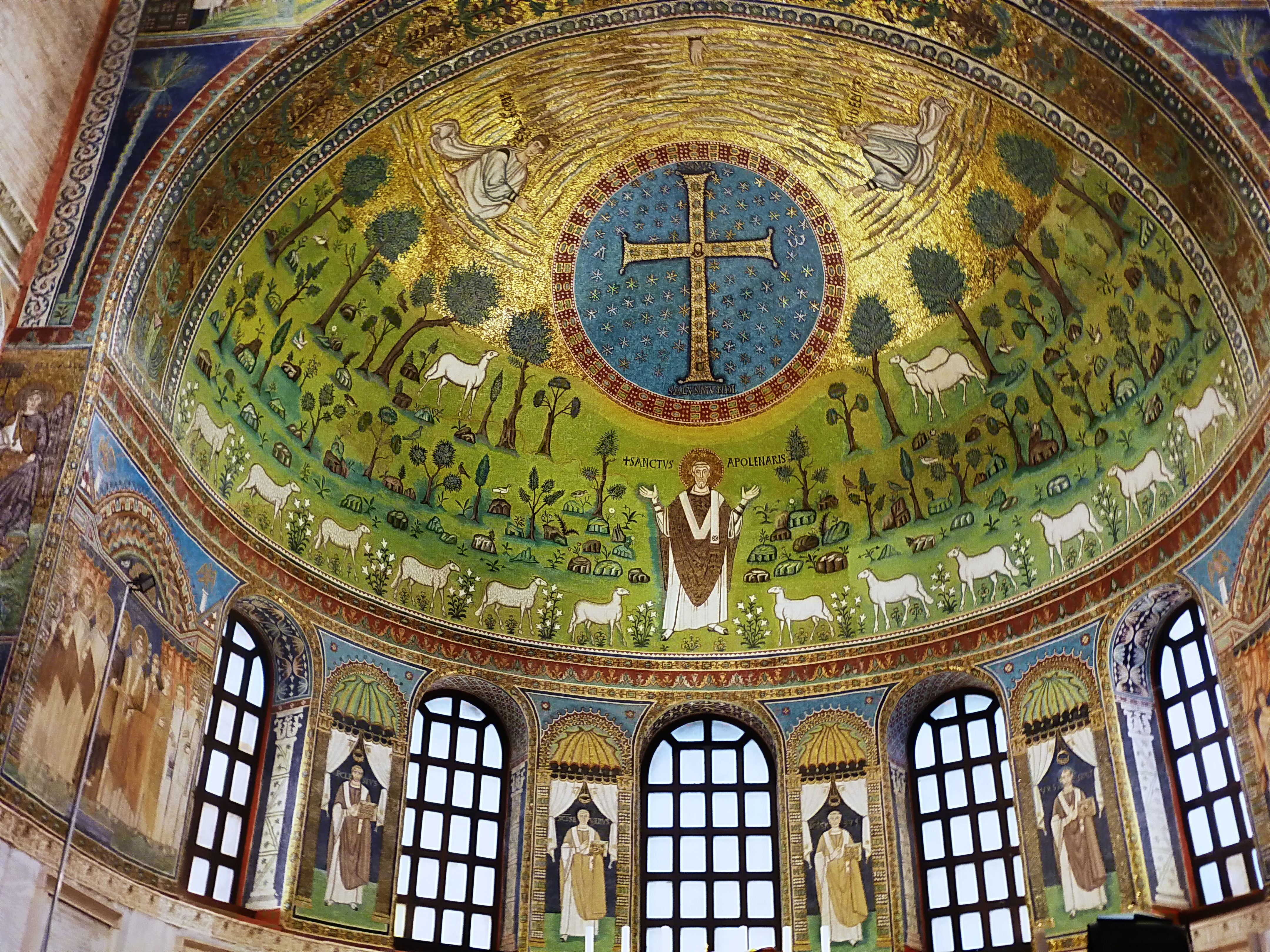 Basilica di Sant'Apollinare in Classe This is a photo of a monument which is part of cultural heritage of Italy.